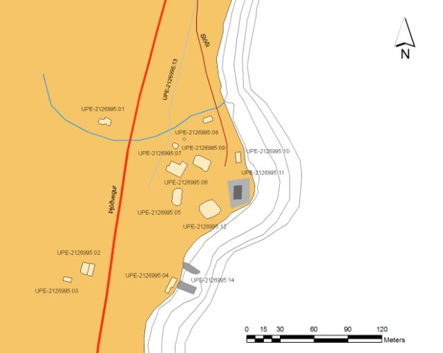 Uppmældar minjar á Uppsalaeyri á Vestfjörðum.